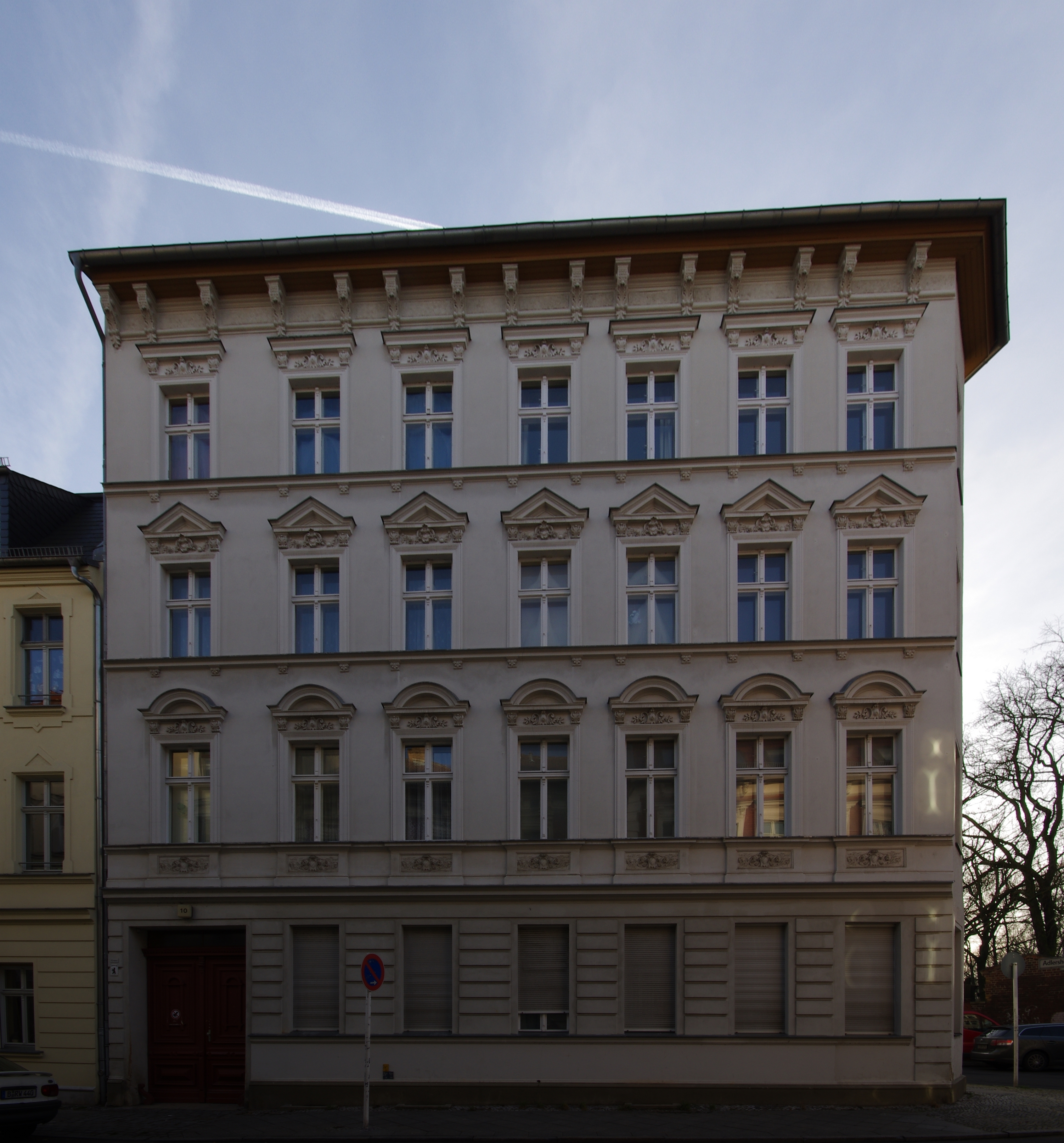 Berlin, Köpenick. Das Haus in der Schönerlinder Straße 10 steht unter Denkmalschutz.